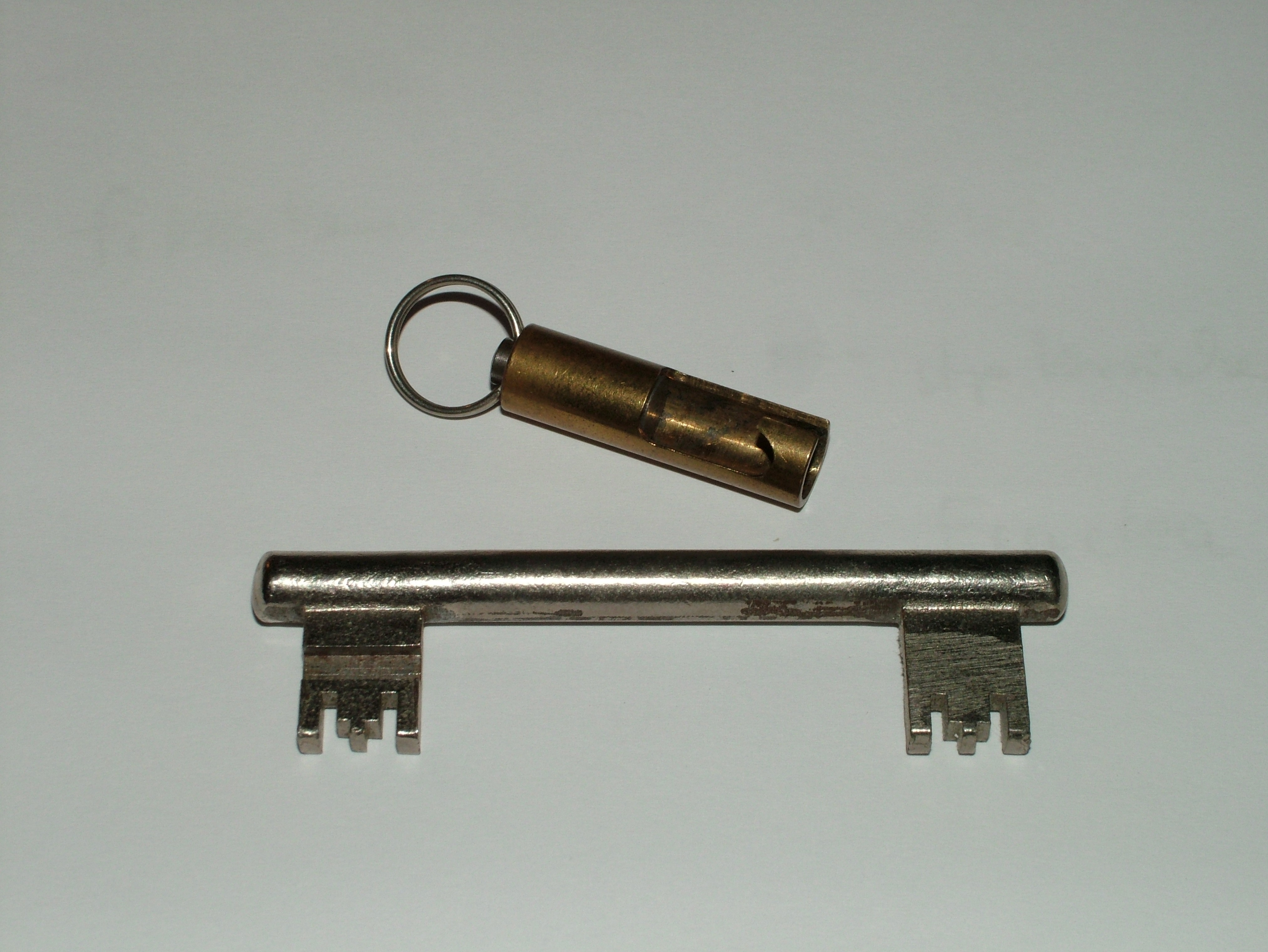 Berliner Schlüssel, Doppelschlüssel, nur in Berlin verwendet